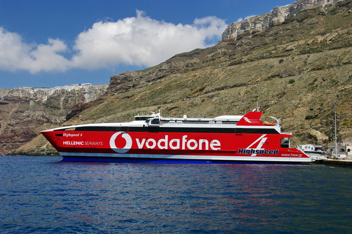 Katamaranfähre, Hafen Athinios, Santorini